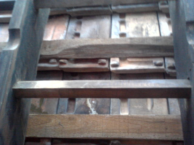 വളയം